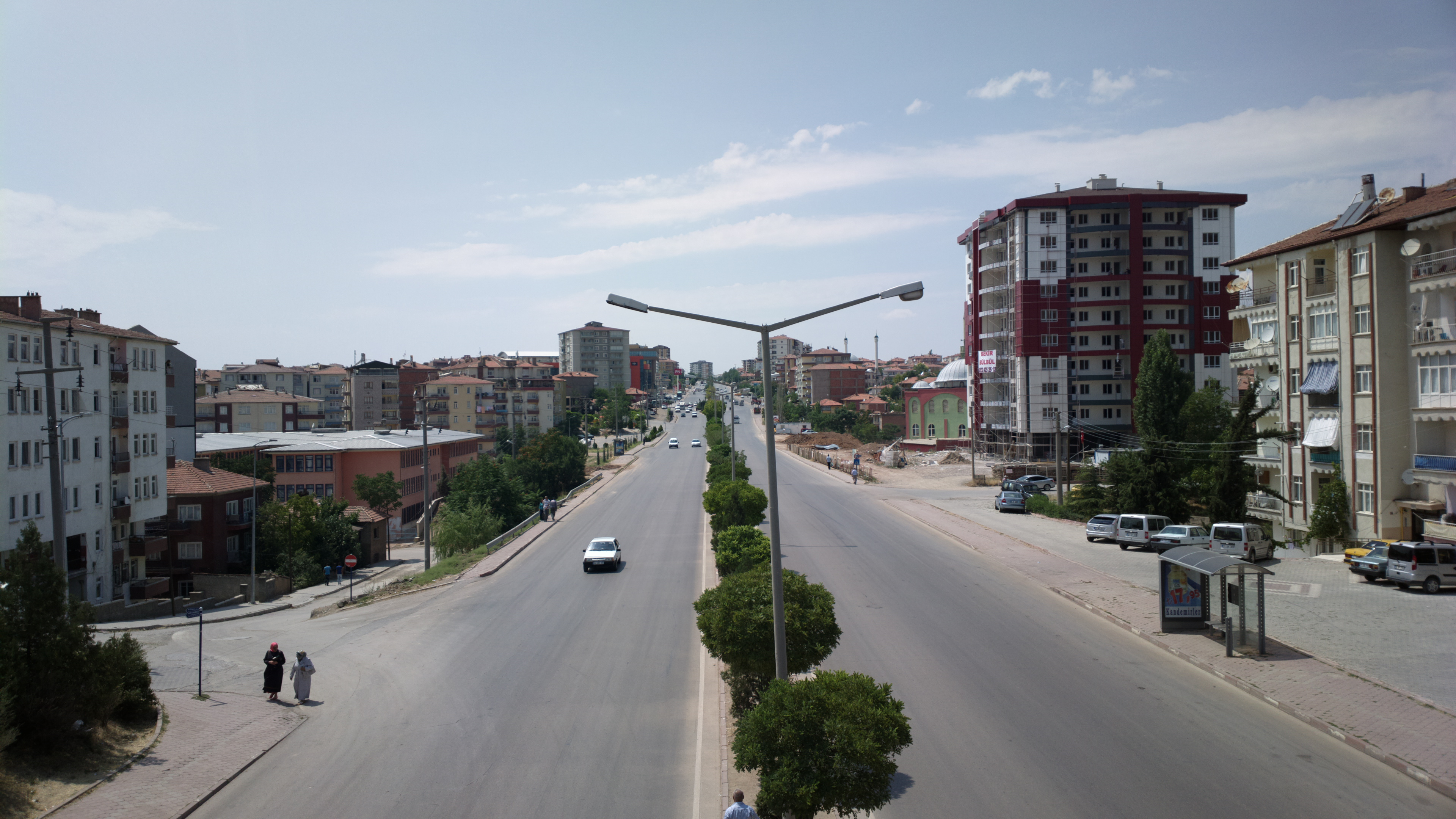 Kırıkkale 1 (2013)